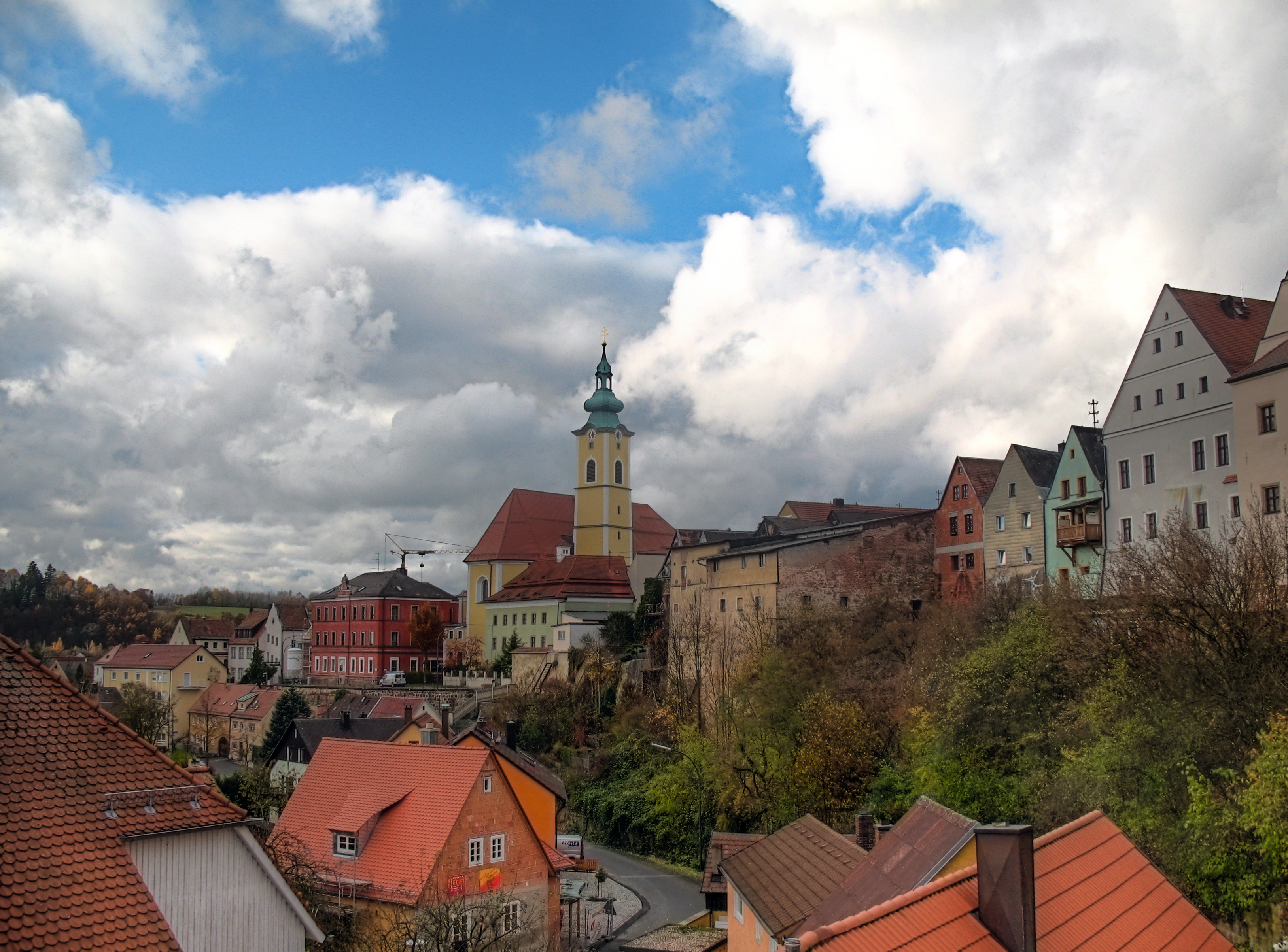 Deutschland, Bayern, Oberpfalz, Neustadt a. d. Waldnaab, Stadtpfarrkirche St. Georg (HDR-Image)